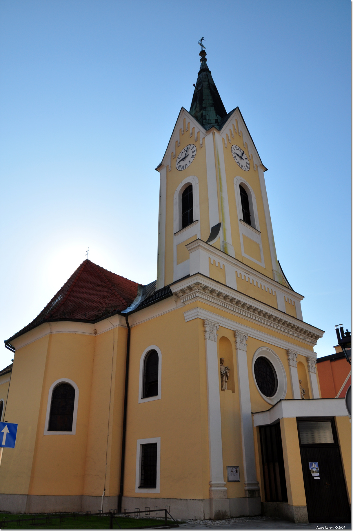 Brezice (7)